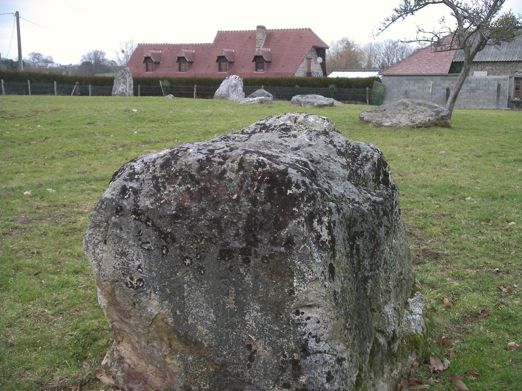 alignement de menhirs de la Plumaudière (commune de Monchauvet, Calvados, France)